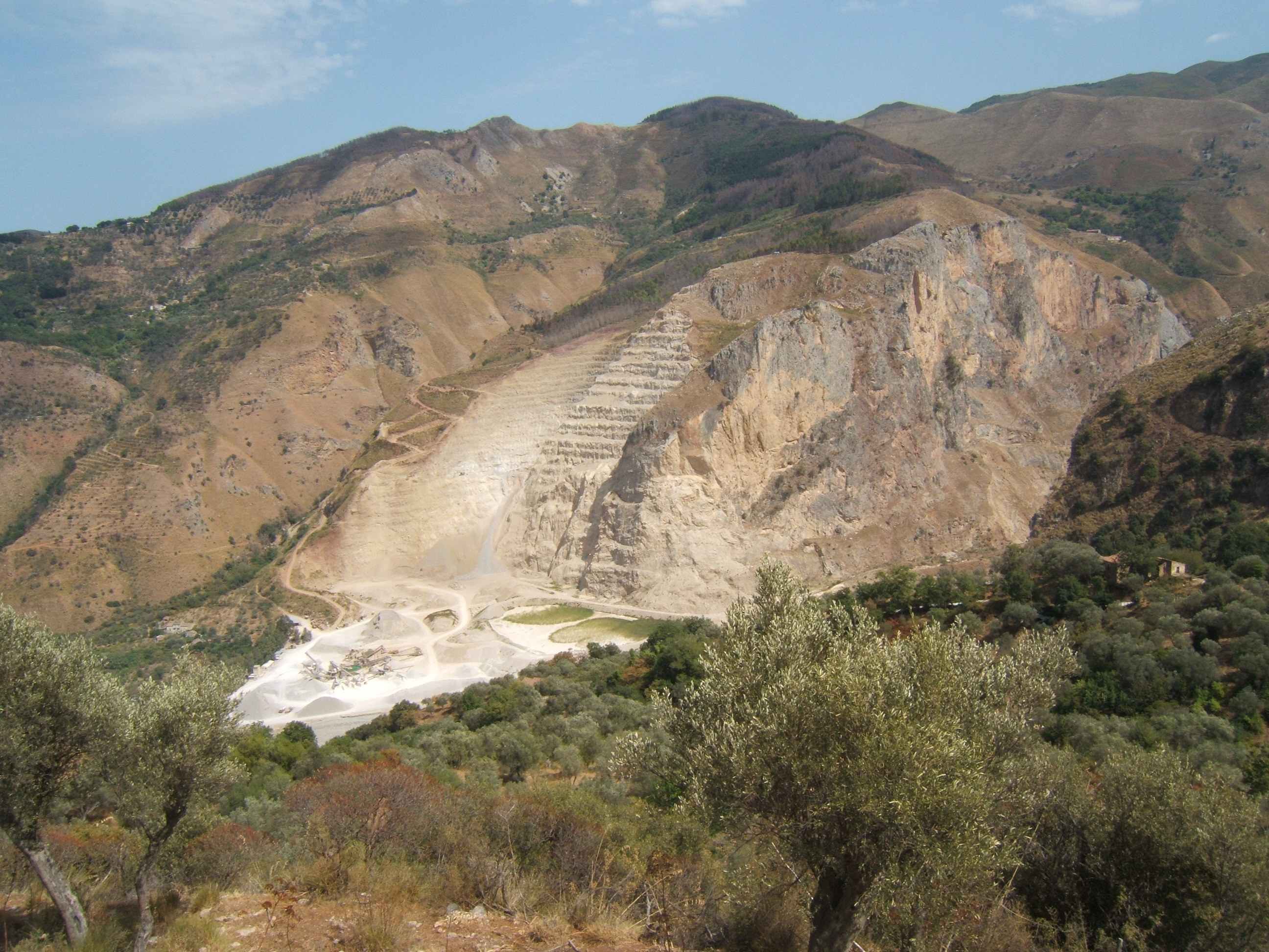 cava sul versante destro del torrente Rosmarino in Sicilia